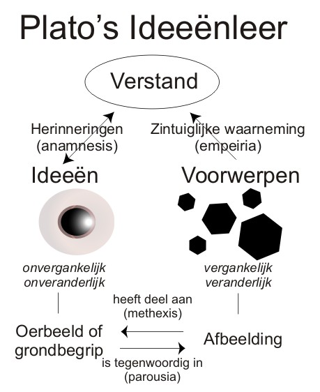 Plato's ideeenleer